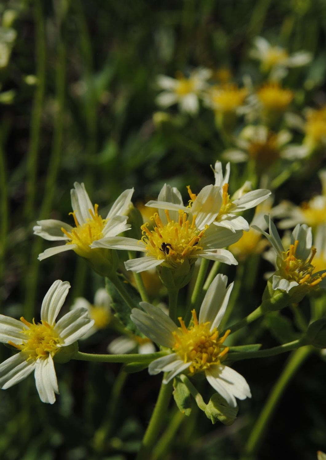 Calea cymosa. Asteraceae, Fotos tomadas al margen del Lago de Palmar entre gramíneas, departamento de Soriano. Uruguay.